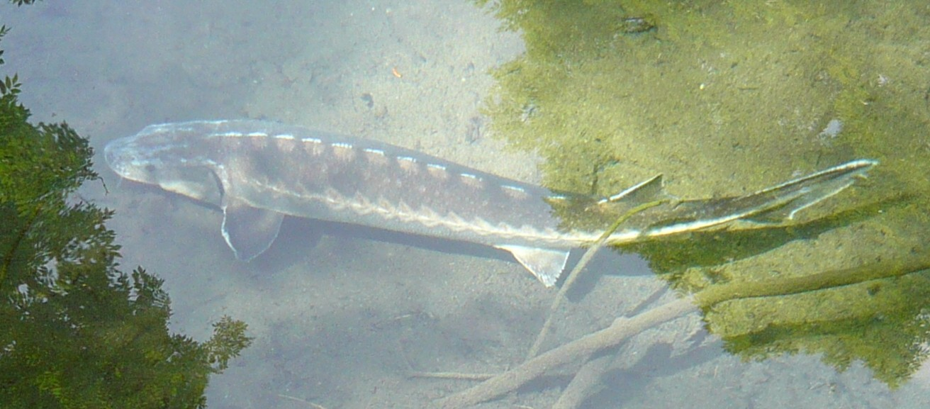 Europäischer Stör